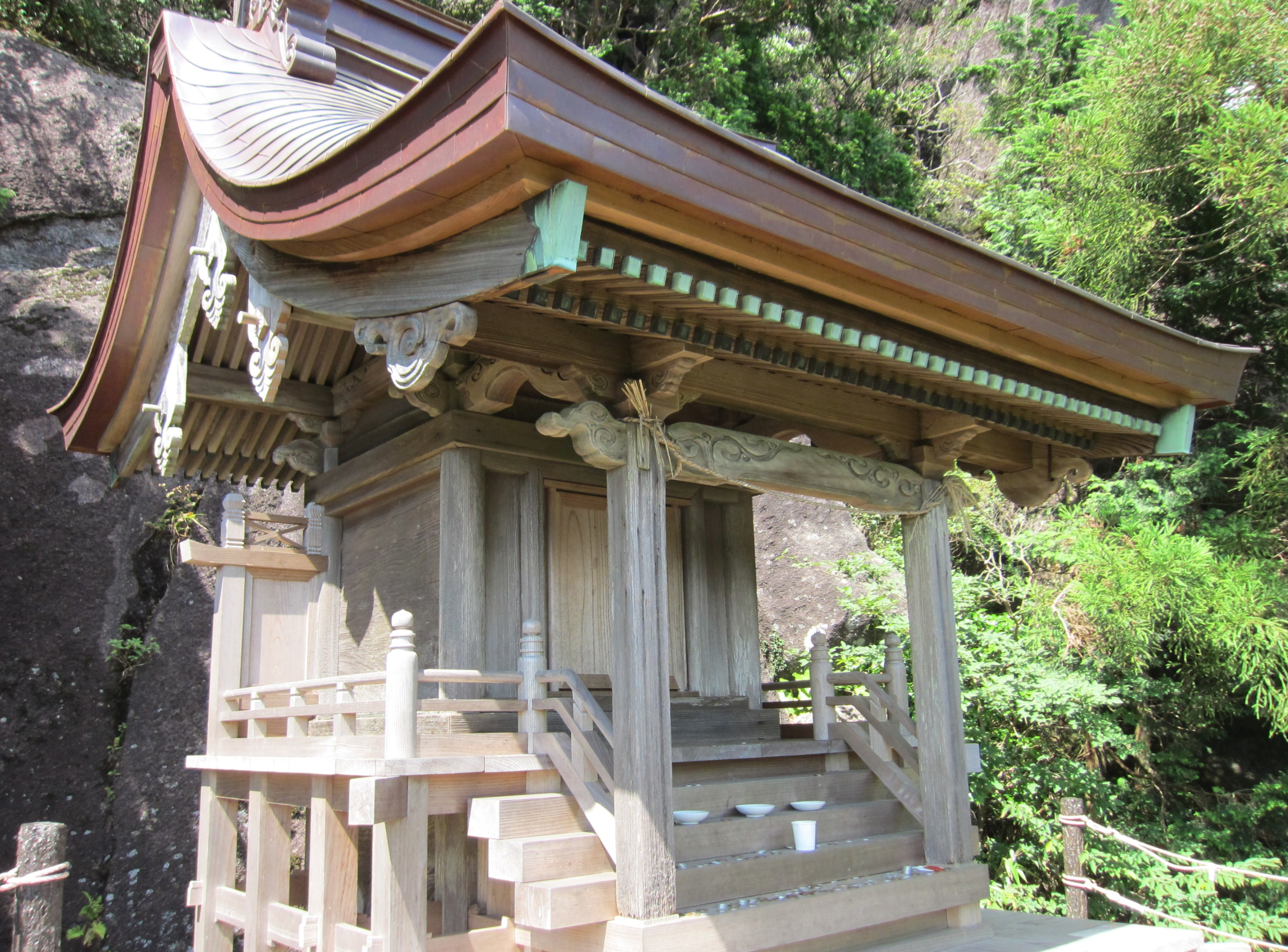 筑波山神社 摂社稲村神社